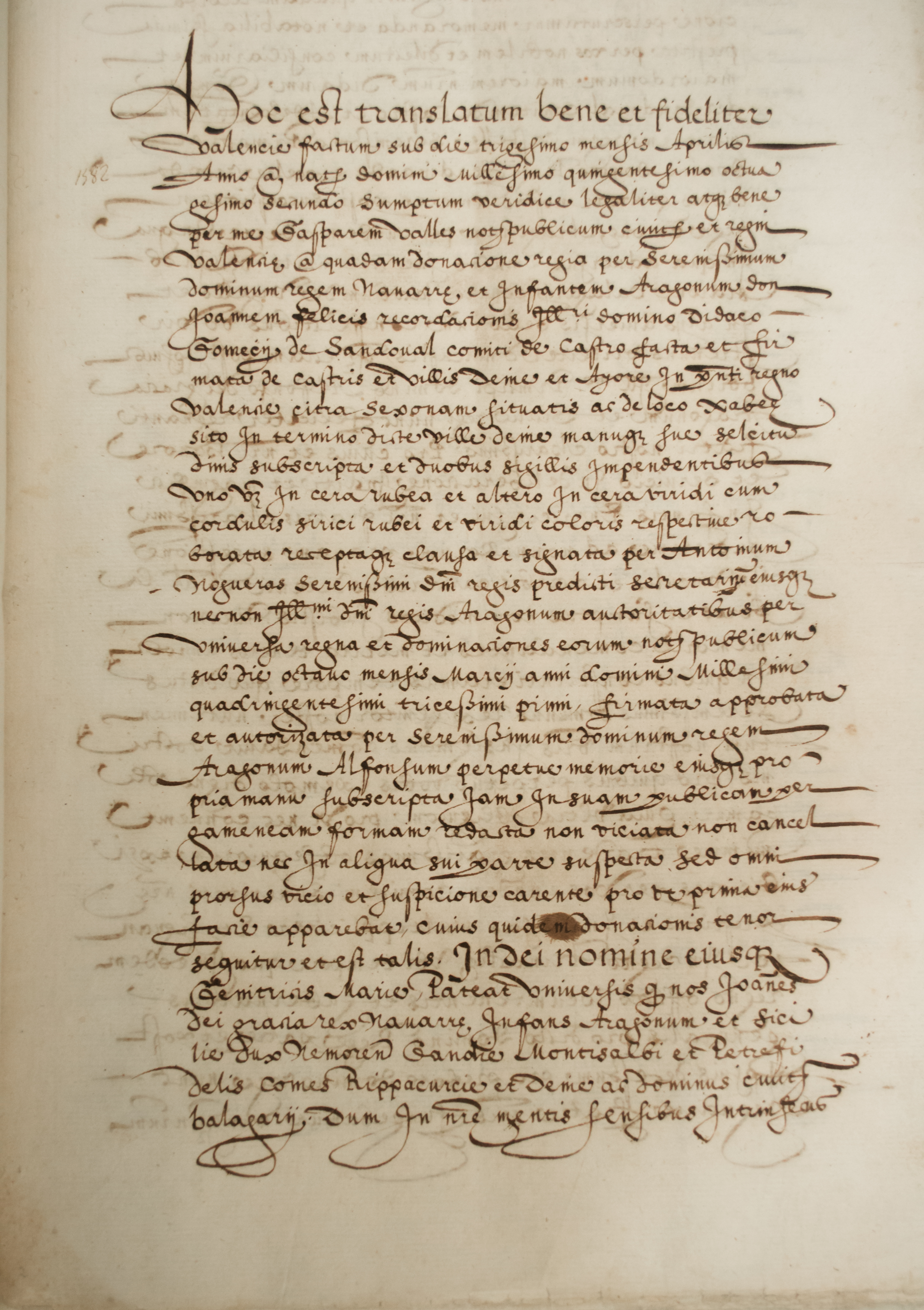 Documento de donación de las villas y castillos de Denia y Ayora , otorgado por el rey Juan II de Aragón (a la sazón rey de Navarra) a Diego Gómez de Sandoval y Rojas, conde de Castrogeriz (Lérida, a 8 de marzo de 1431).